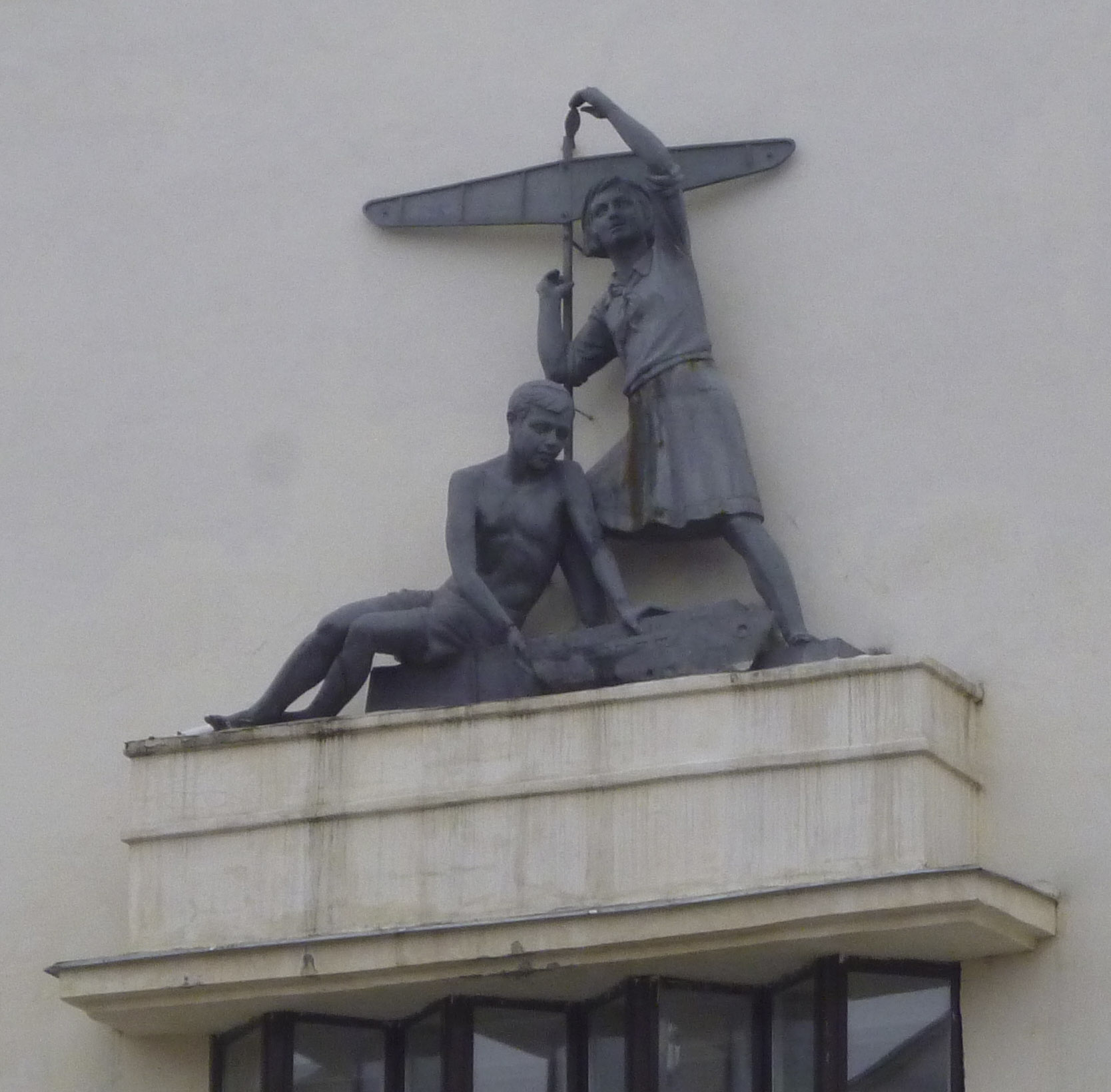 Скульптурная композиция мальчика и девочки с моделью планера на фасаде поликлиники Гражданской авиации на Песчаной улице (1937)